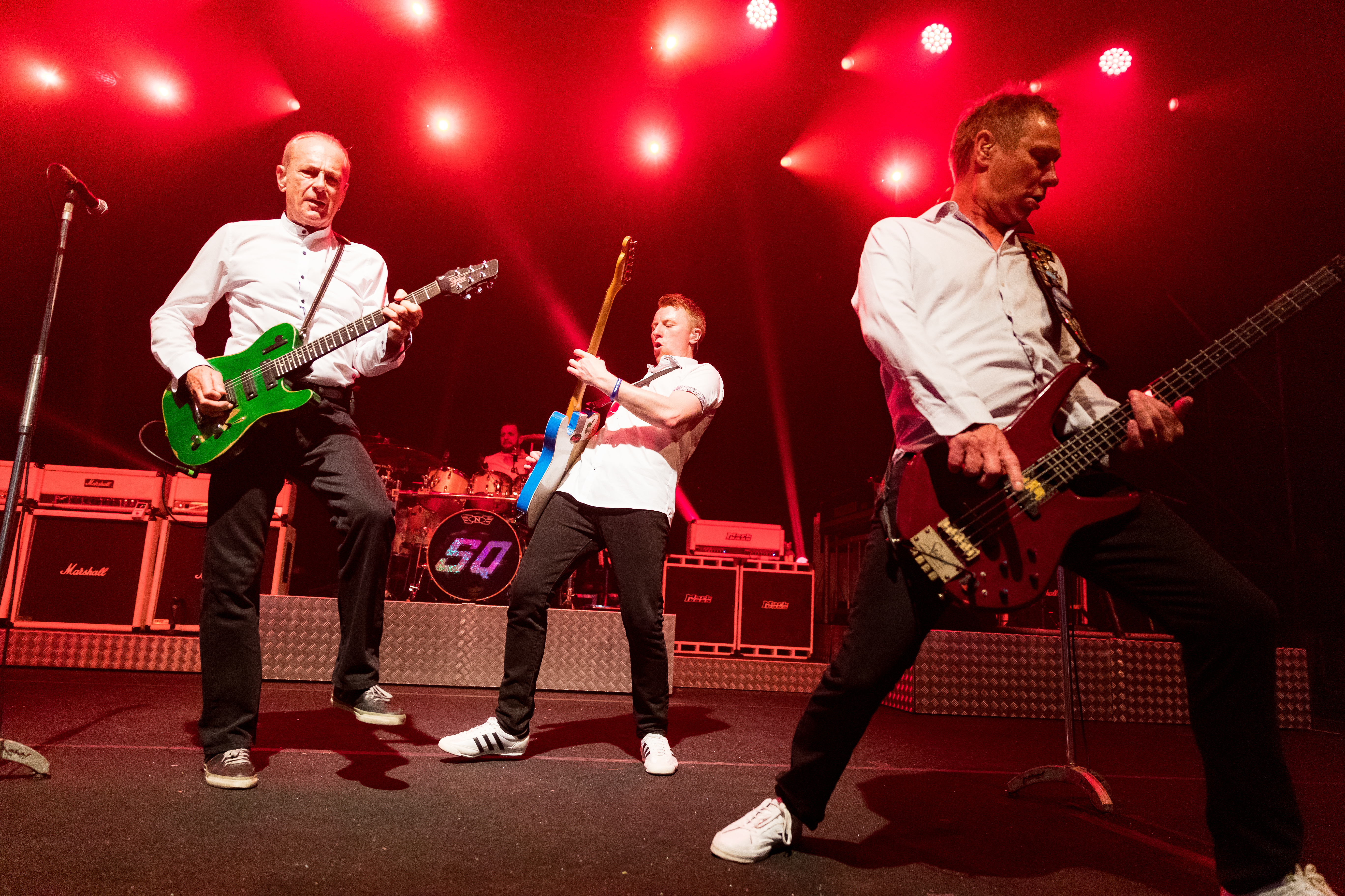 Status Quo during Zeltfestival Rhein-Neckar ( at Maimarktgelände, Mannheim, Baden-Württemberg, Germany on 2019-06-05, Photo: Sven Mandel Promotion by Delta Konzerte (